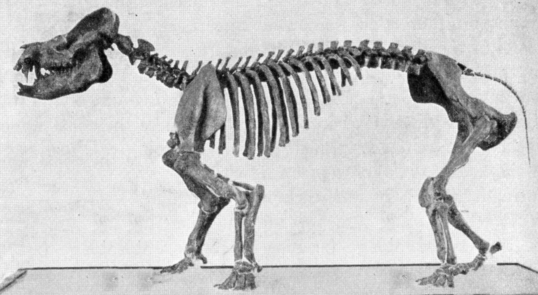 Coryphodon skeleton.